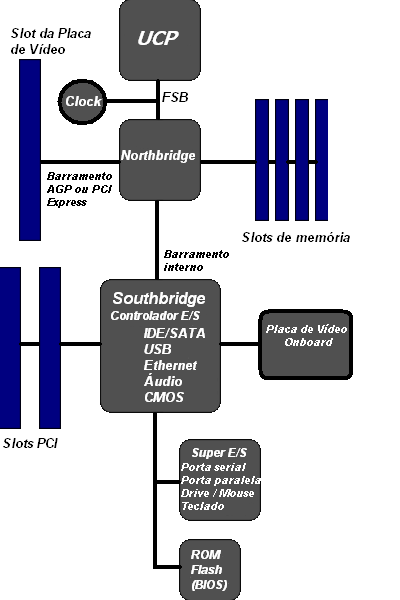 Diagrama de placa-mãe típica